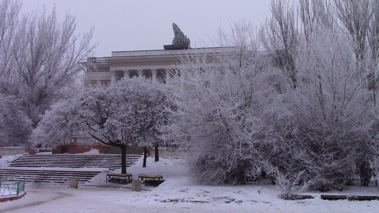 центральная площадь города